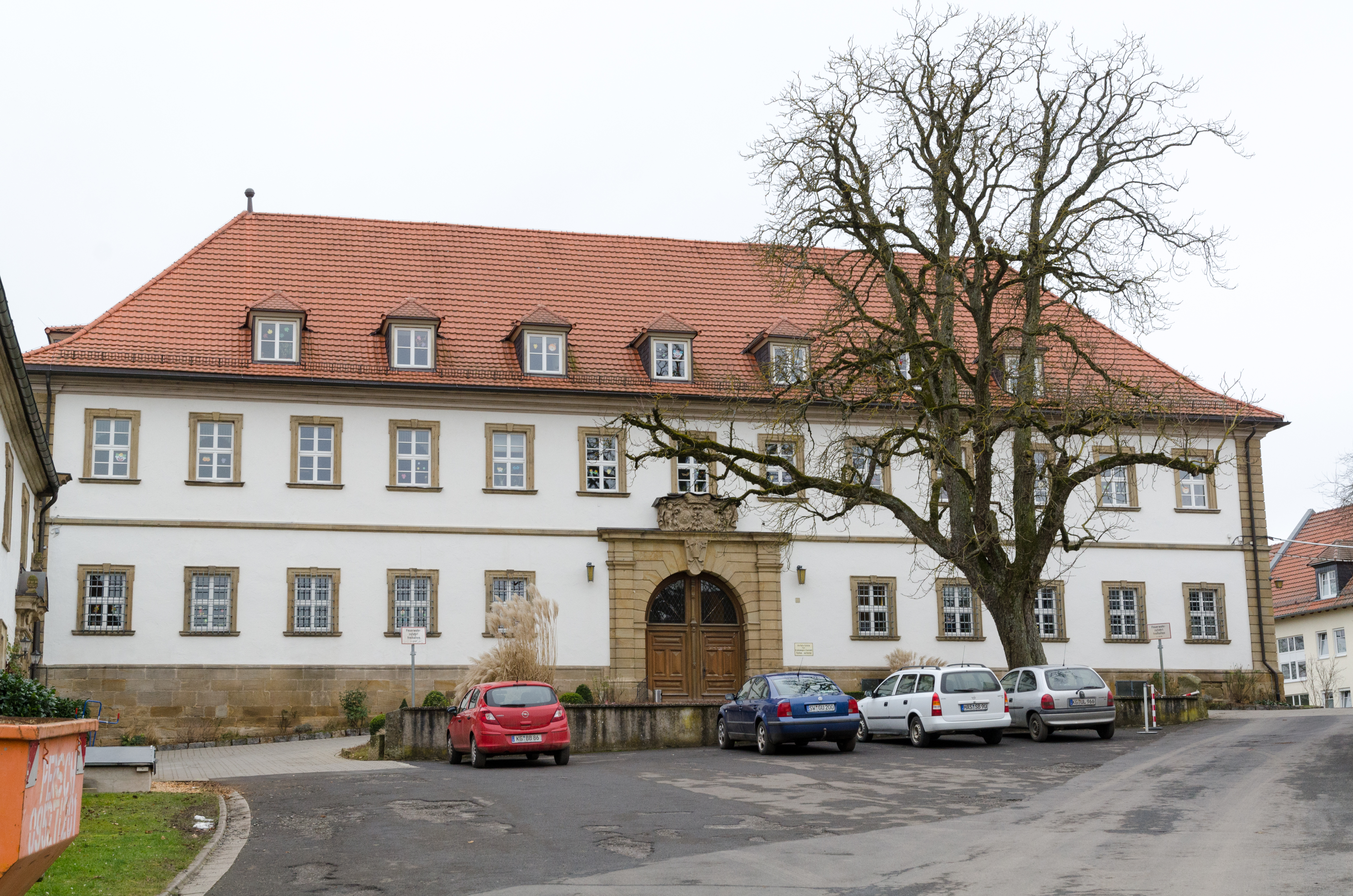 Statlauringen, Birnfeld, Schloßgasse 5